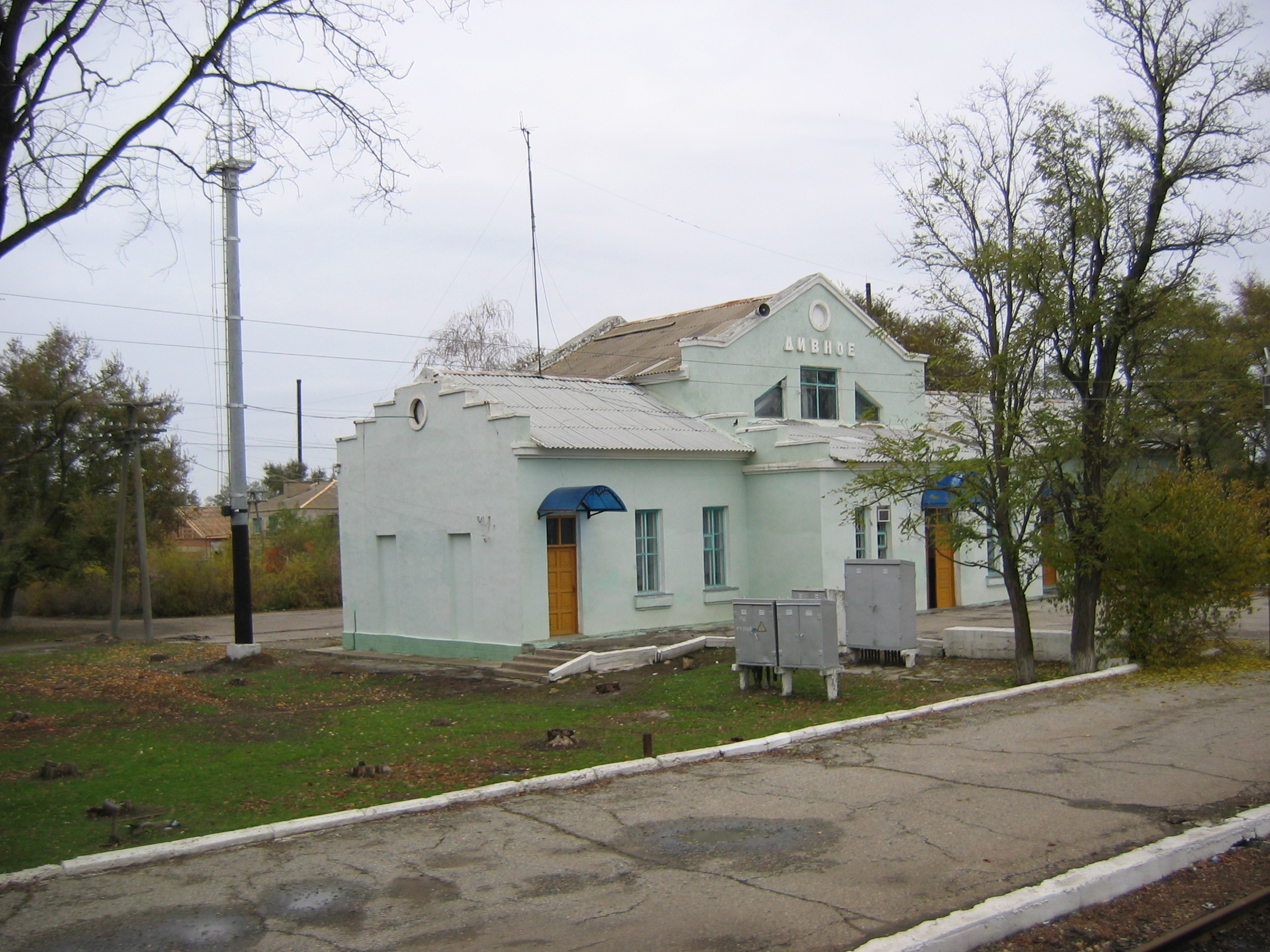 Вокзал ст. Дивное в 2005 г.